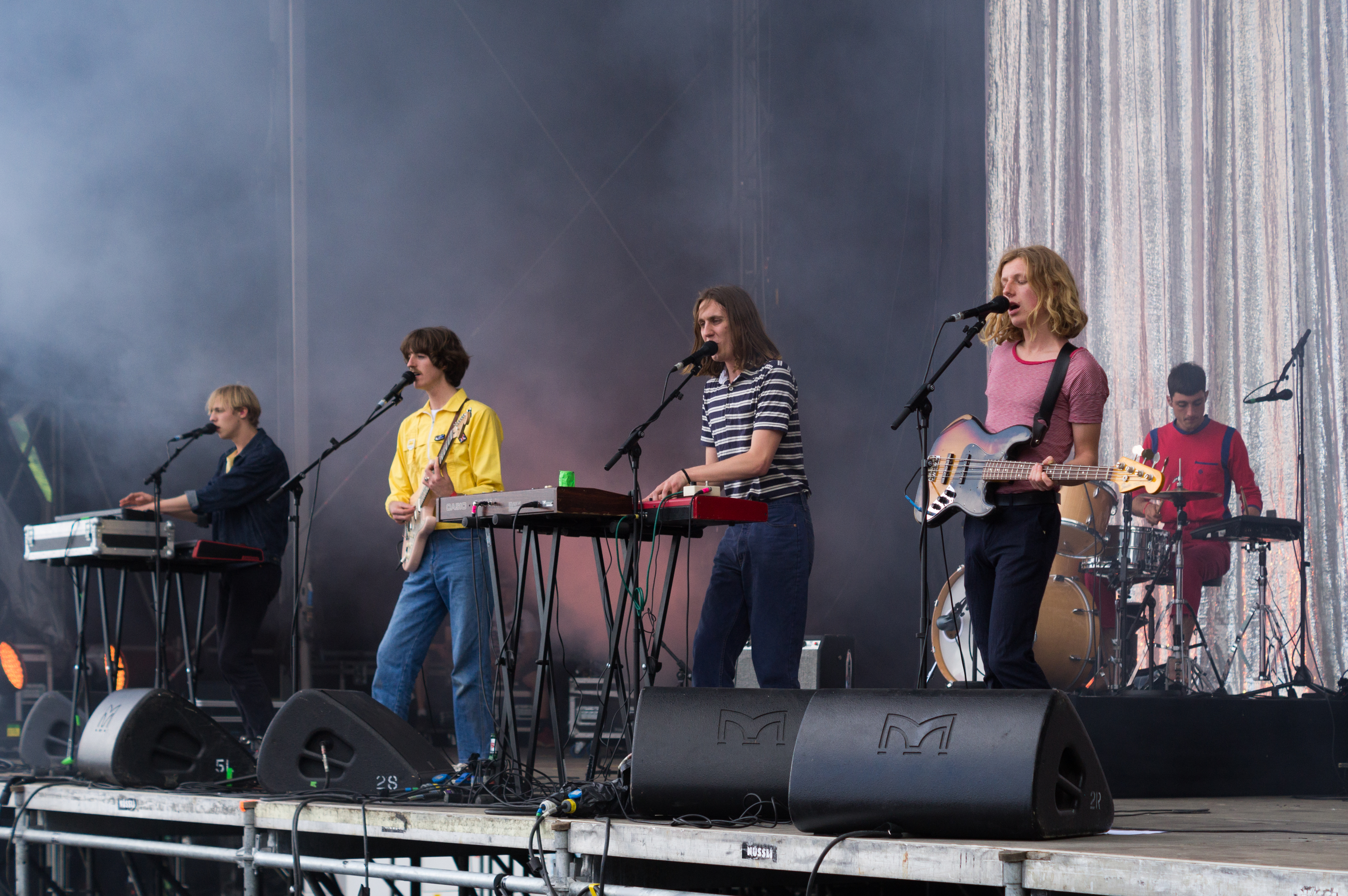 Die Band Parcels auf dem Kosmonaut Festival 2017 in Chemnitz